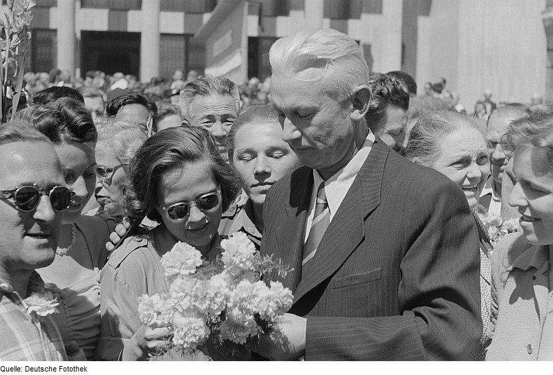 Original image description from the Deutsche Fotothek Alexander Alexandrowitsch Fadejew, sowjetischer Schriftsteller und Publizist, Wizepräsident des Weltfriedensrates. Autogrammvergabe